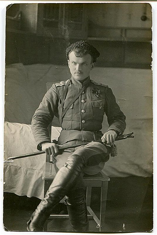 Калмыков Иван Павлович (1890 - 1920)